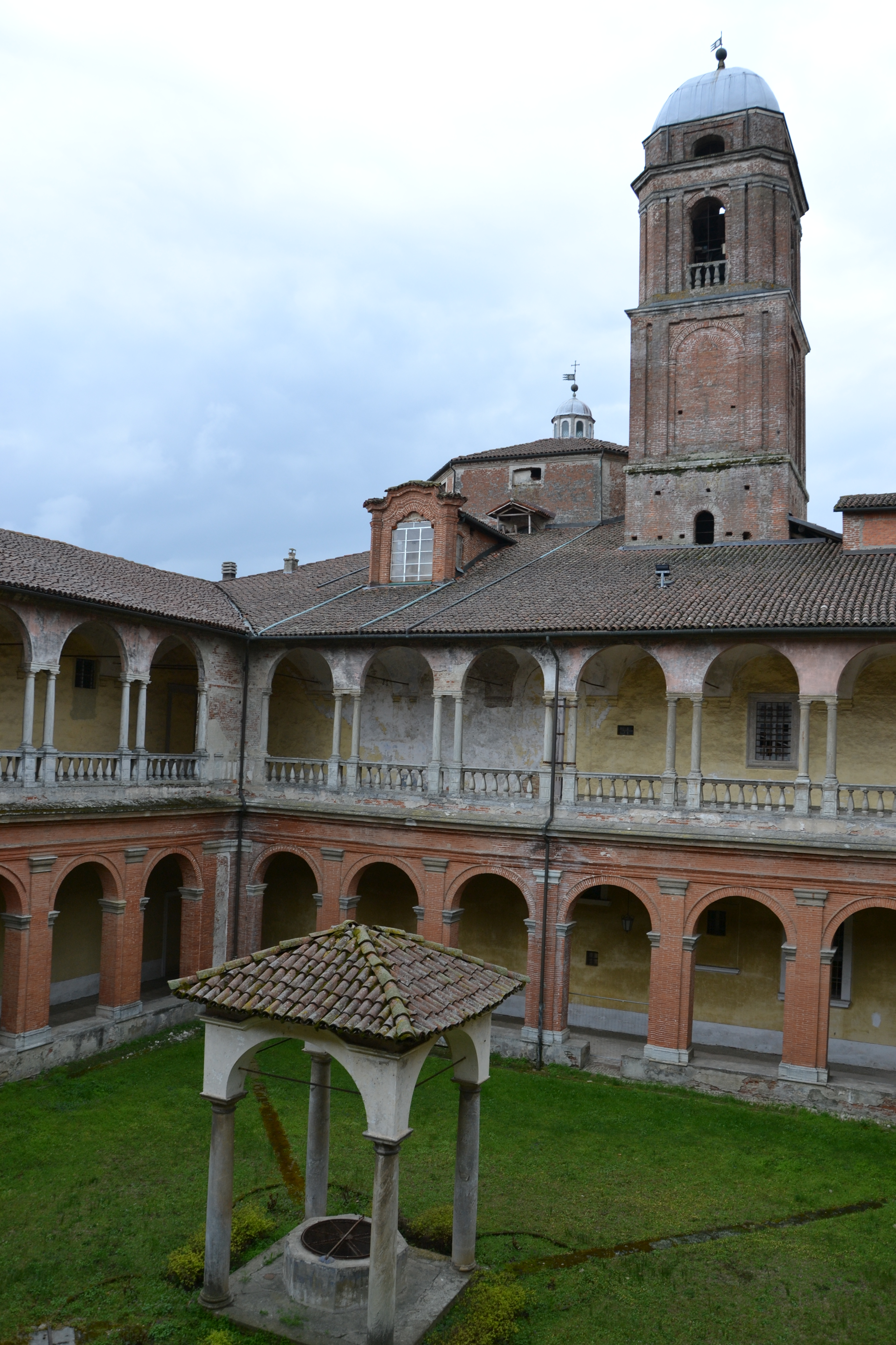 convento domenicano di Santa Croce a Bosco Marengo (AL) realizzato per volontà di papa Pio V nella seconda metà del sec. XVI, nel 1862 divenne riformatorio giovanile fino al 1989.